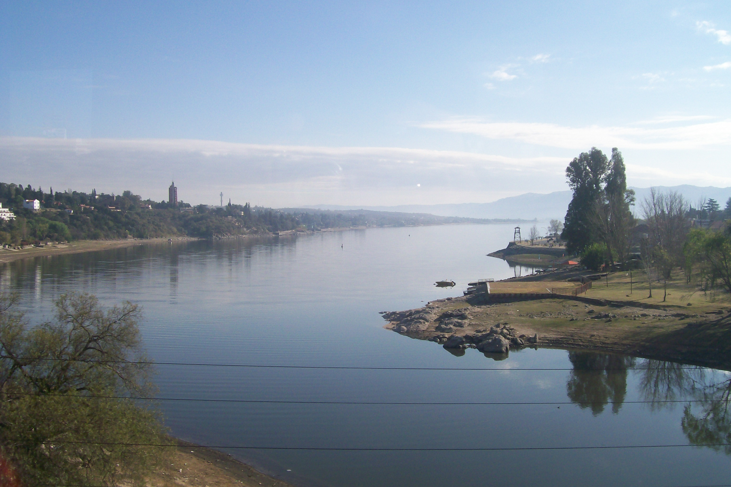 lgo san roque